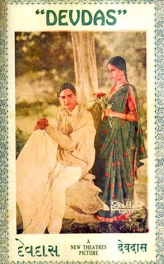 Poster de la version hindi de Devdas (1935)